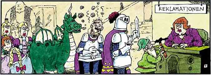 "Der Froschkönig" ("Frog Prince", I.Astalos)